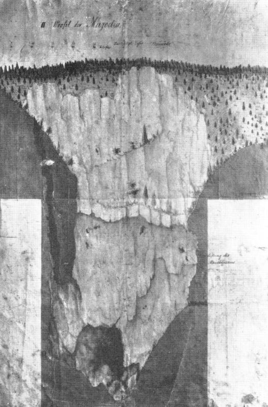 Rudzinského profil Macochy z roku 1784